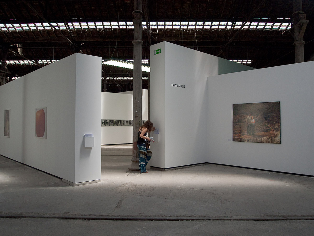 Taryn Simon Friends of the LUMA Foundation trail Les Rencontres d'Arles, Atelier de Mécanique, Arles